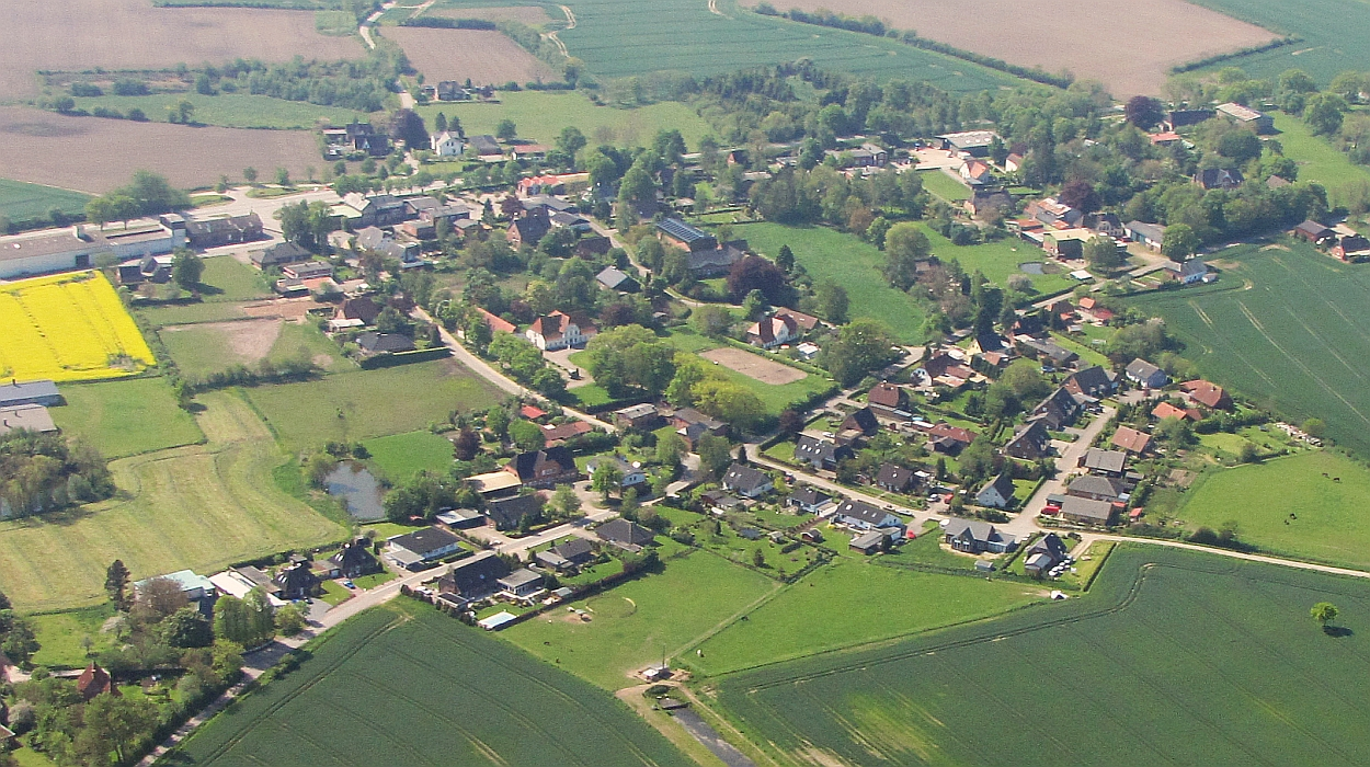 Luftbild Steinberg (Ostsee) Amt Geltinger Bucht Region Angeln Kreis Schleswig-Flensburg Foto Wolfgang Pehlemann IMG_6695